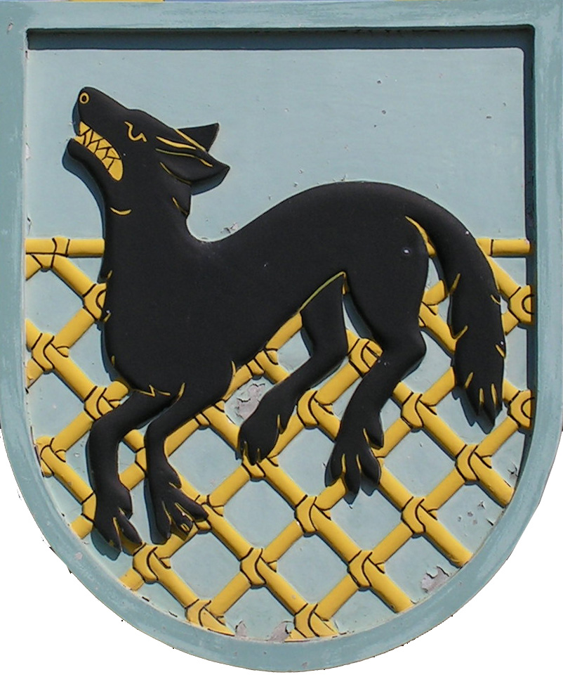 Erb obce Smrečany